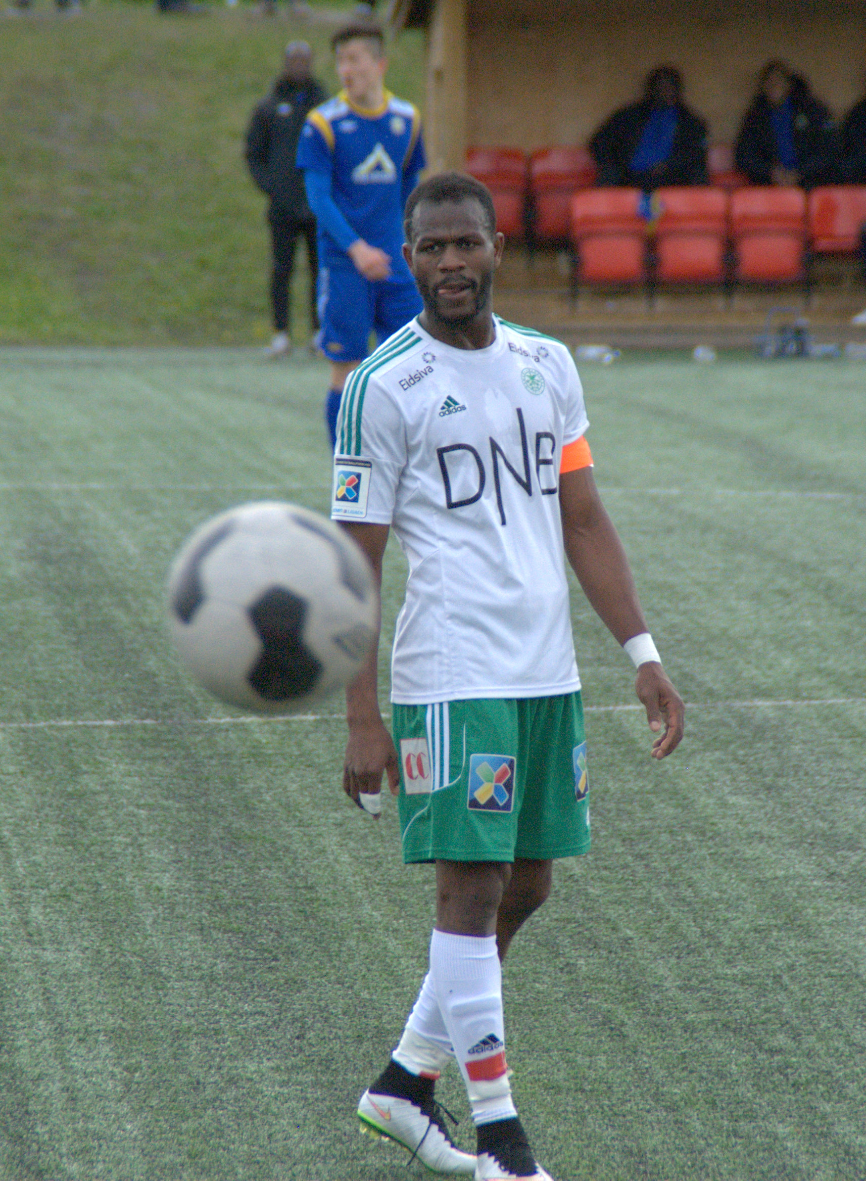 Aziz Idris for Hamarkameratene